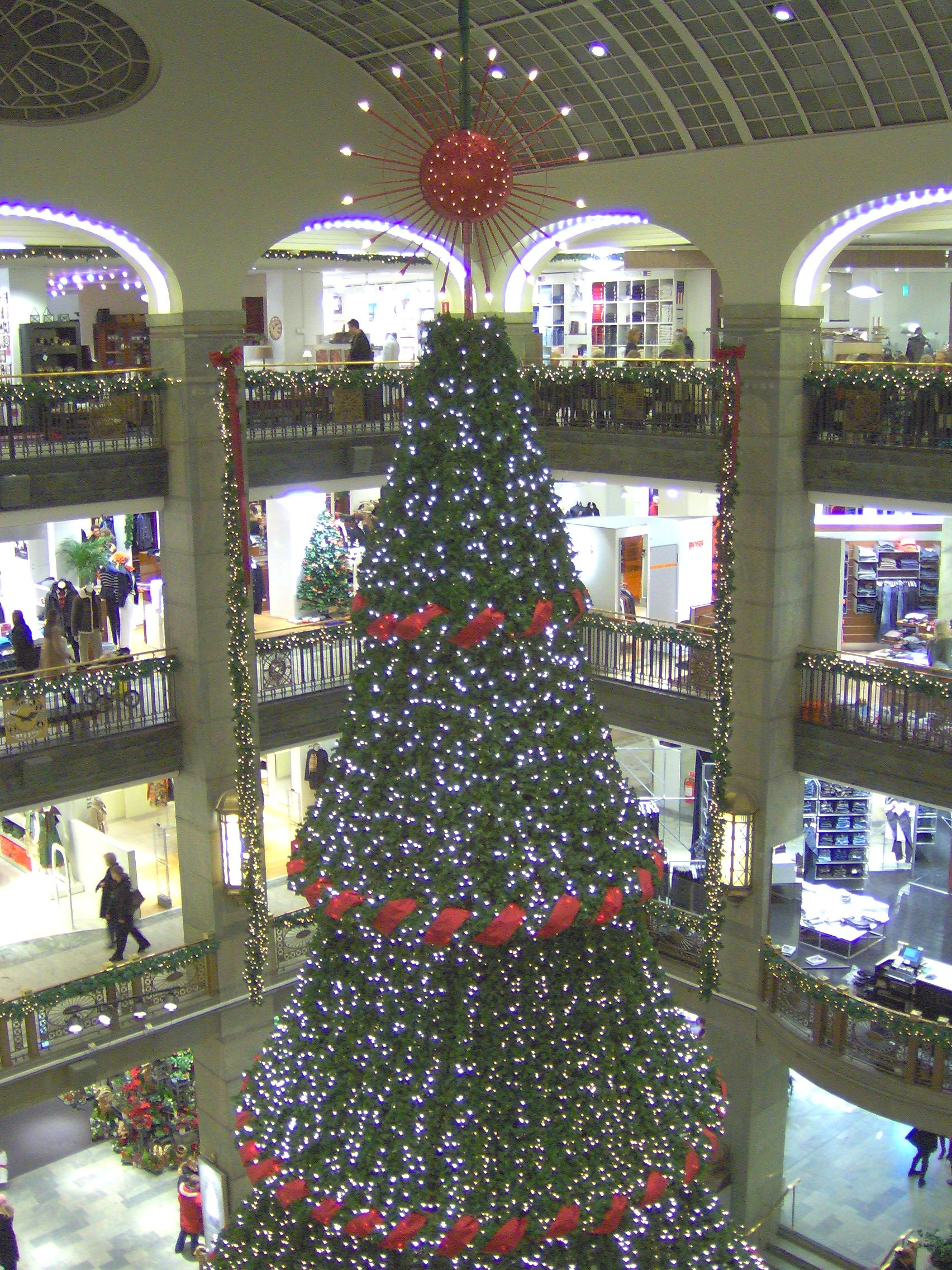 Den hängande och snurrande grani NK.s ljusgård julen 2005. The hanging and swinging X-mas tree inside NK Stockholm, Sweden.